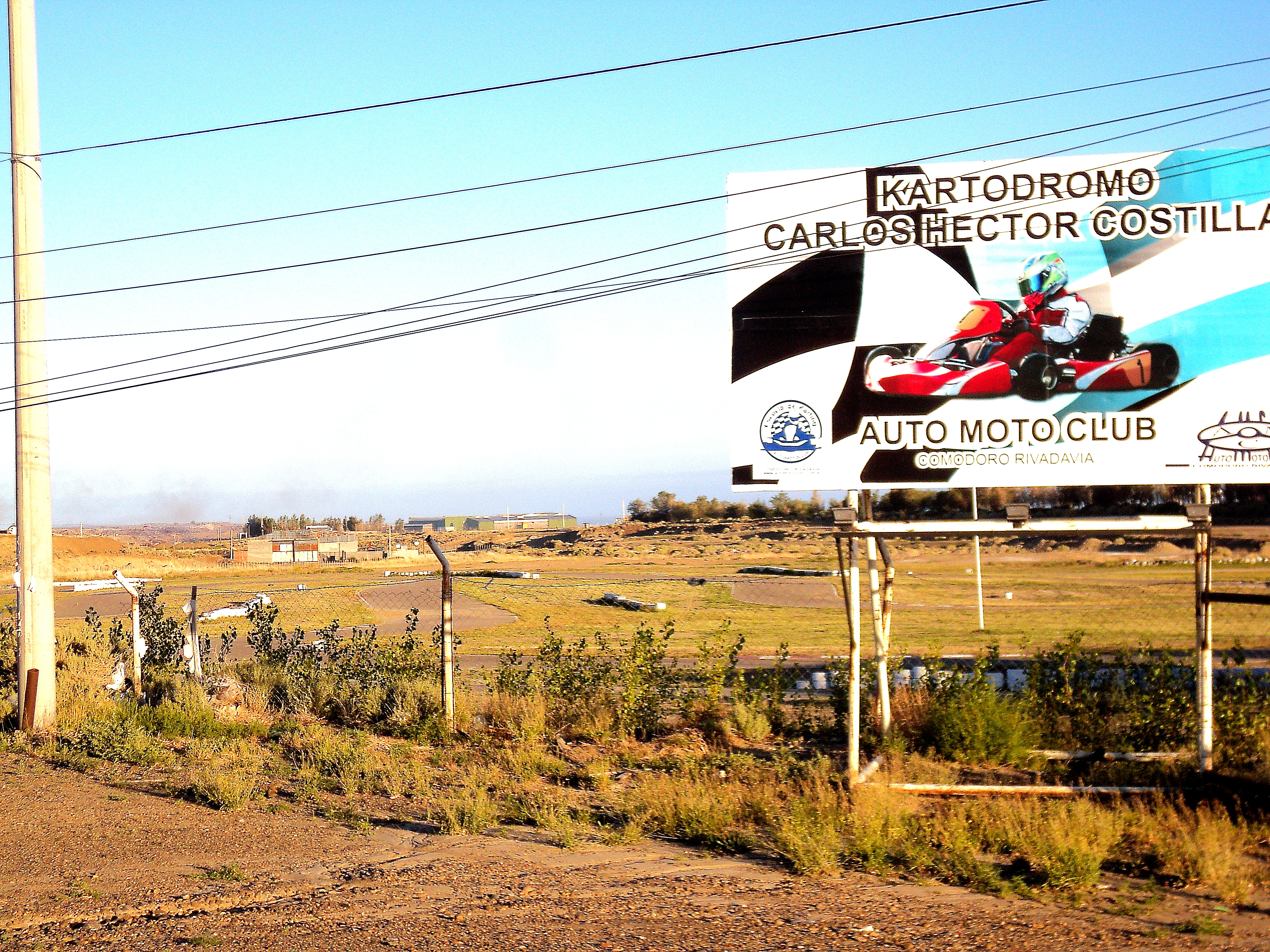 el cartodoromo Carlos Costilla en el autodromo General San Martin